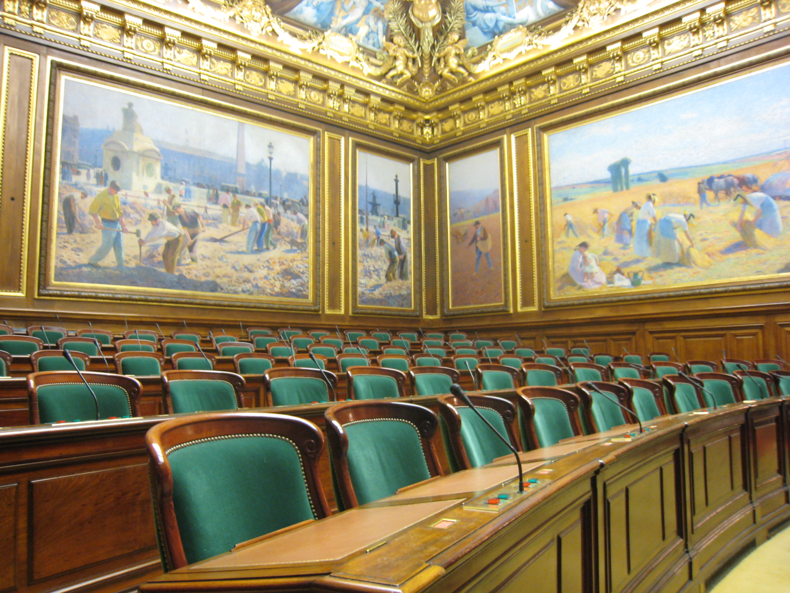 Salle des séances pour l'assemblée plénière. Peintures de Henri Martin.